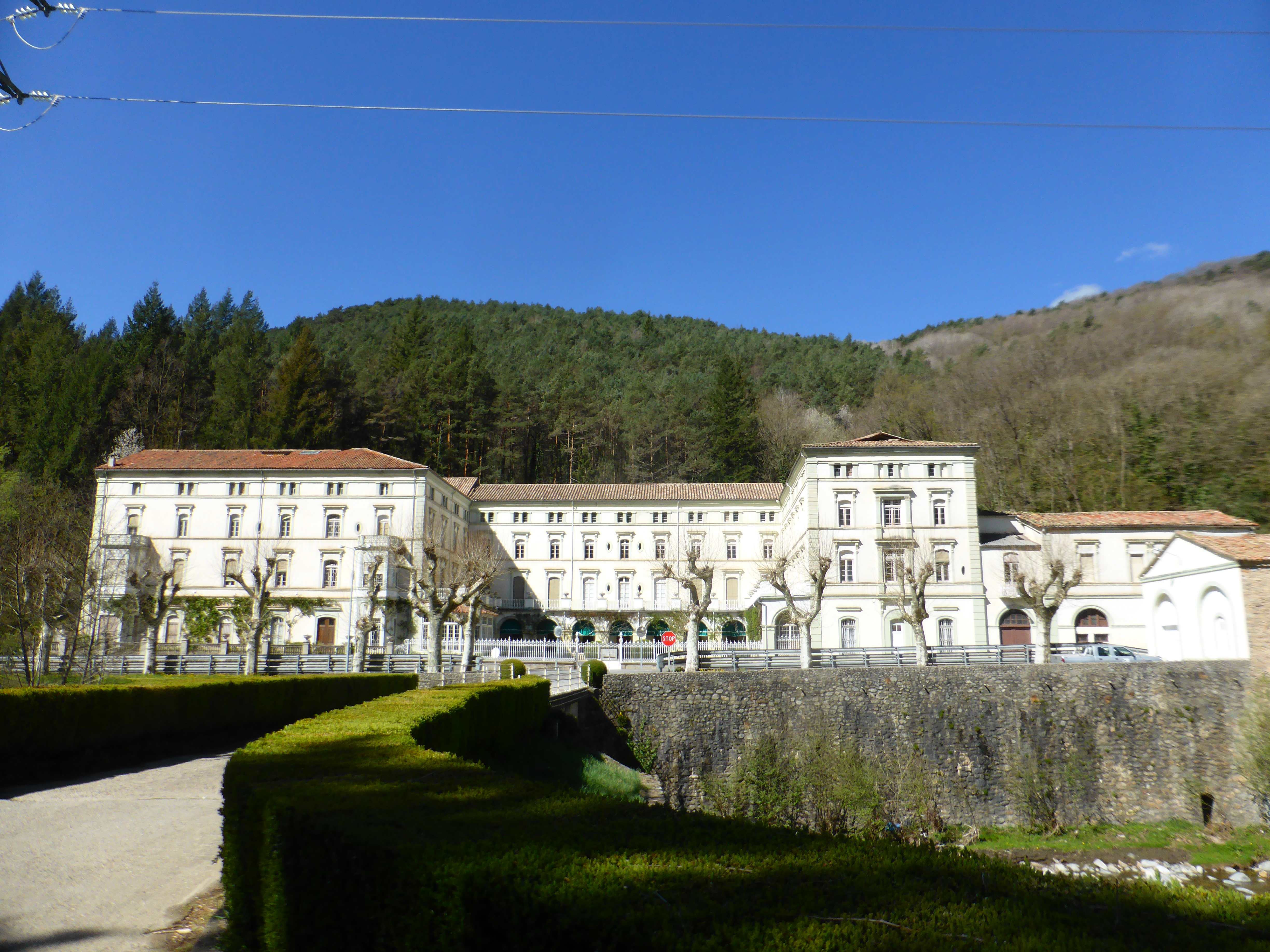 Balneari de Montagut